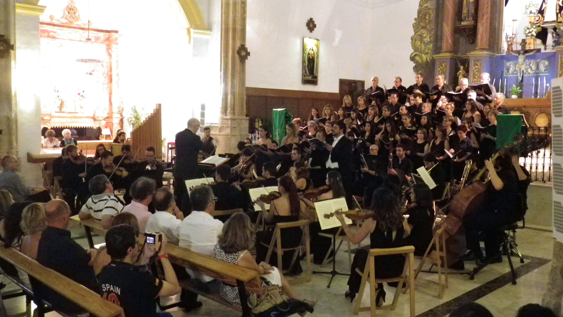 Fotografía de una actuación pública de la Orquesta Ciudad de Almería y de la Coral Virgen del Mar de Almería en la Iglesia Parroquial de Santiago en Vélez Blanco, provincia de Almería, Andalucía, España, dentro del XIII Festival de Música Renacentista y Barroca de esta localidad.